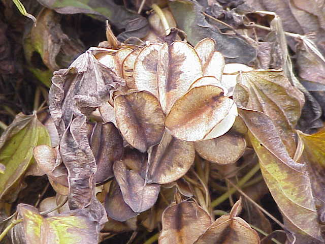 Species: Dioscorea balcanica Family: Dioscoreaceae Image No. 3